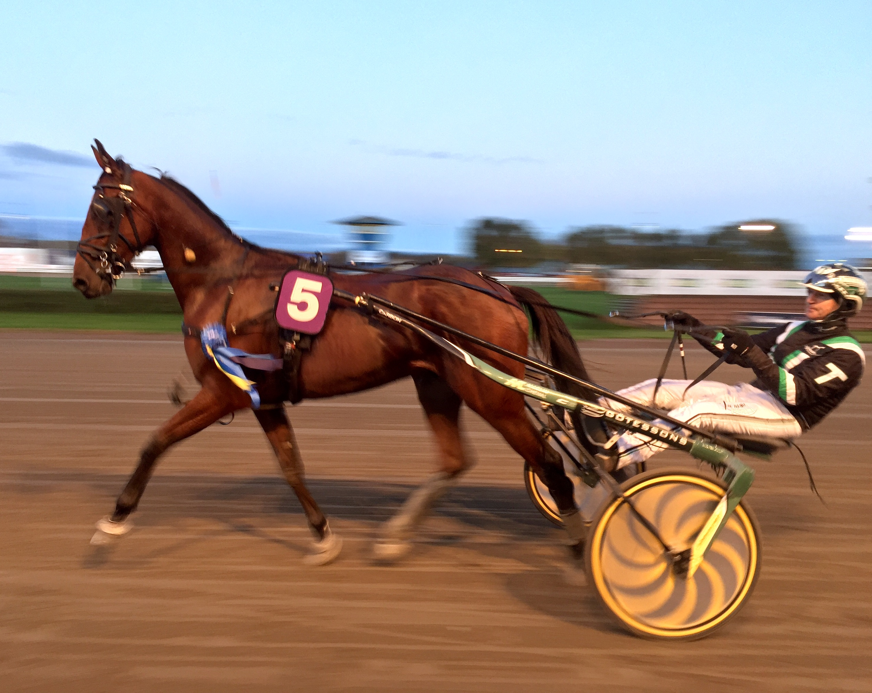 Maze Runner och Johnny Takter efter segern i 2-åringsloppet Svampen Örebro den 21 oktober 2017 på Örebrotravet.